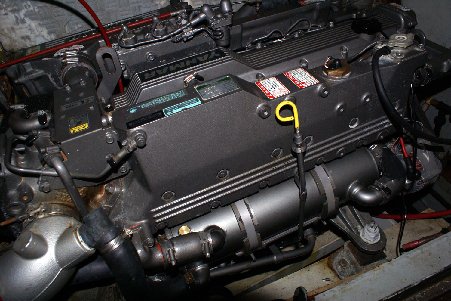 Yanmar 6LP-DTP engine on Kama Hele